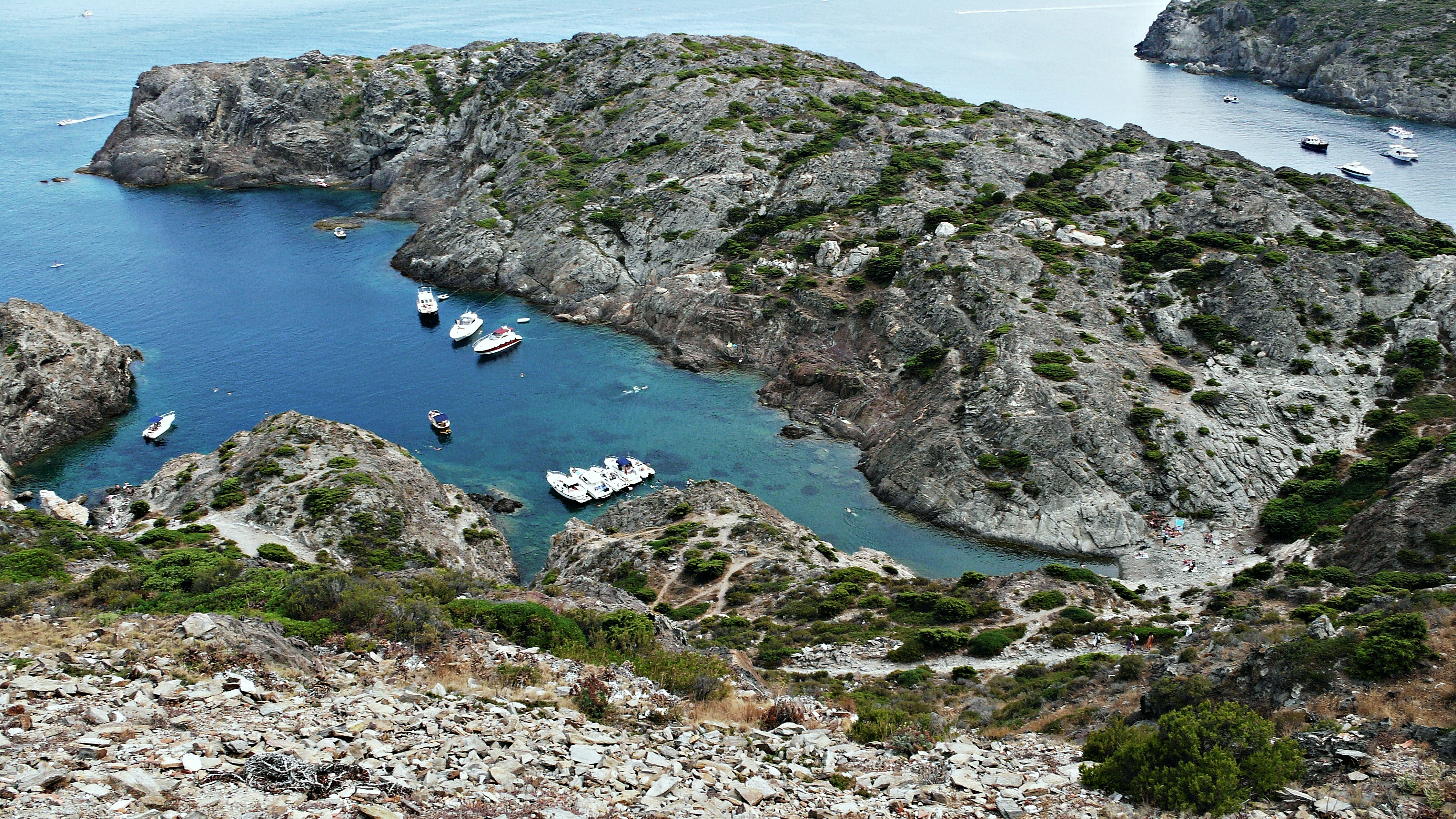 alt emporda-cataluña